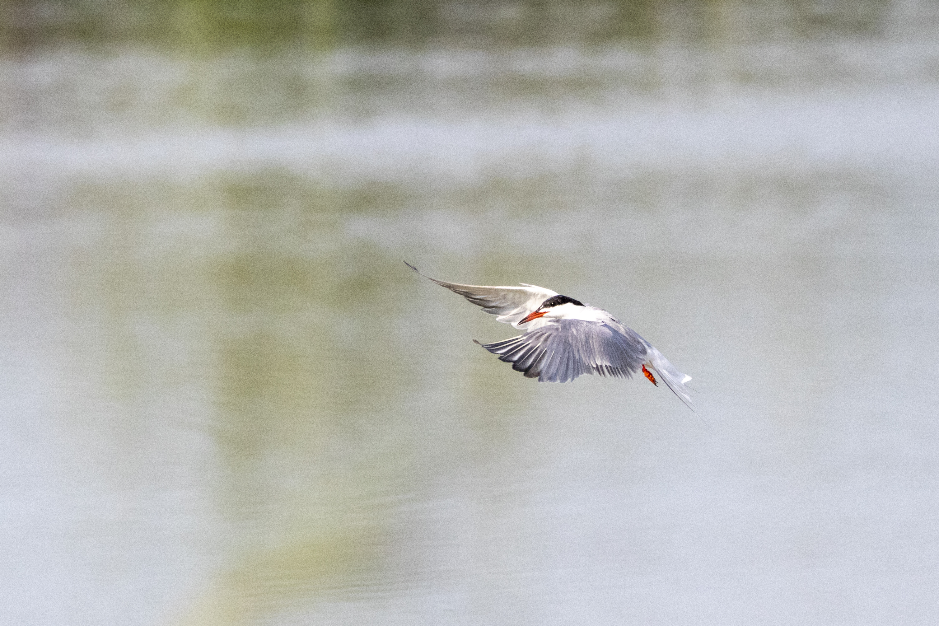 Visdief in de Brabantse Biesbosch